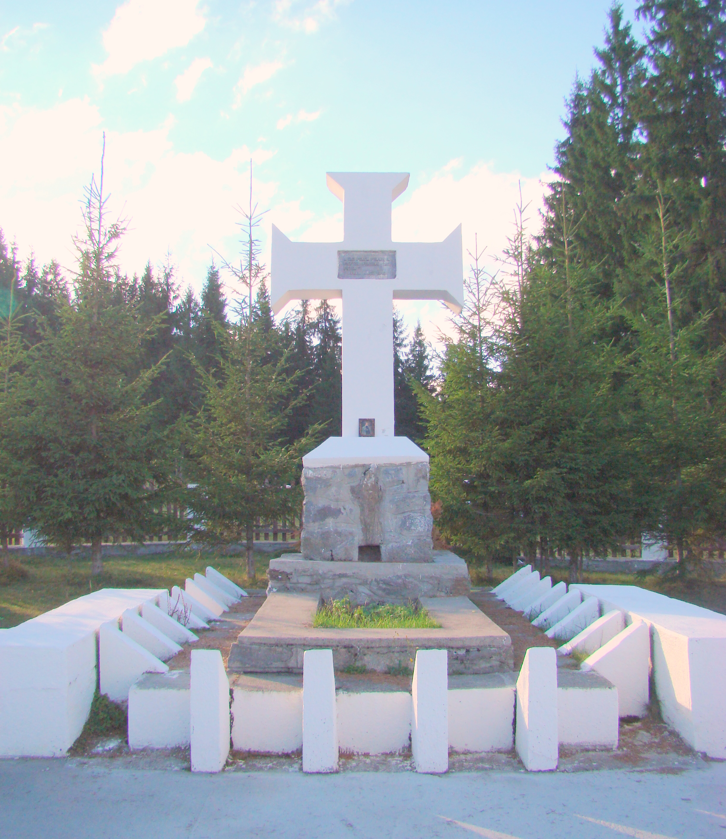 Crucea lui Avram Iancu, "Fântânele", sat MĂRIŞEL (la ieșirea spre Beliș)